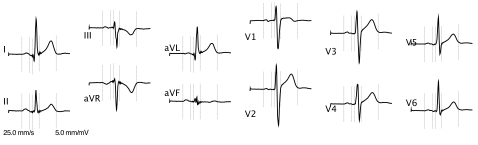 Les 12 dérivations d'un ECG, un cycle de chacune des 12 dérivations, sans quadrillage de fond.